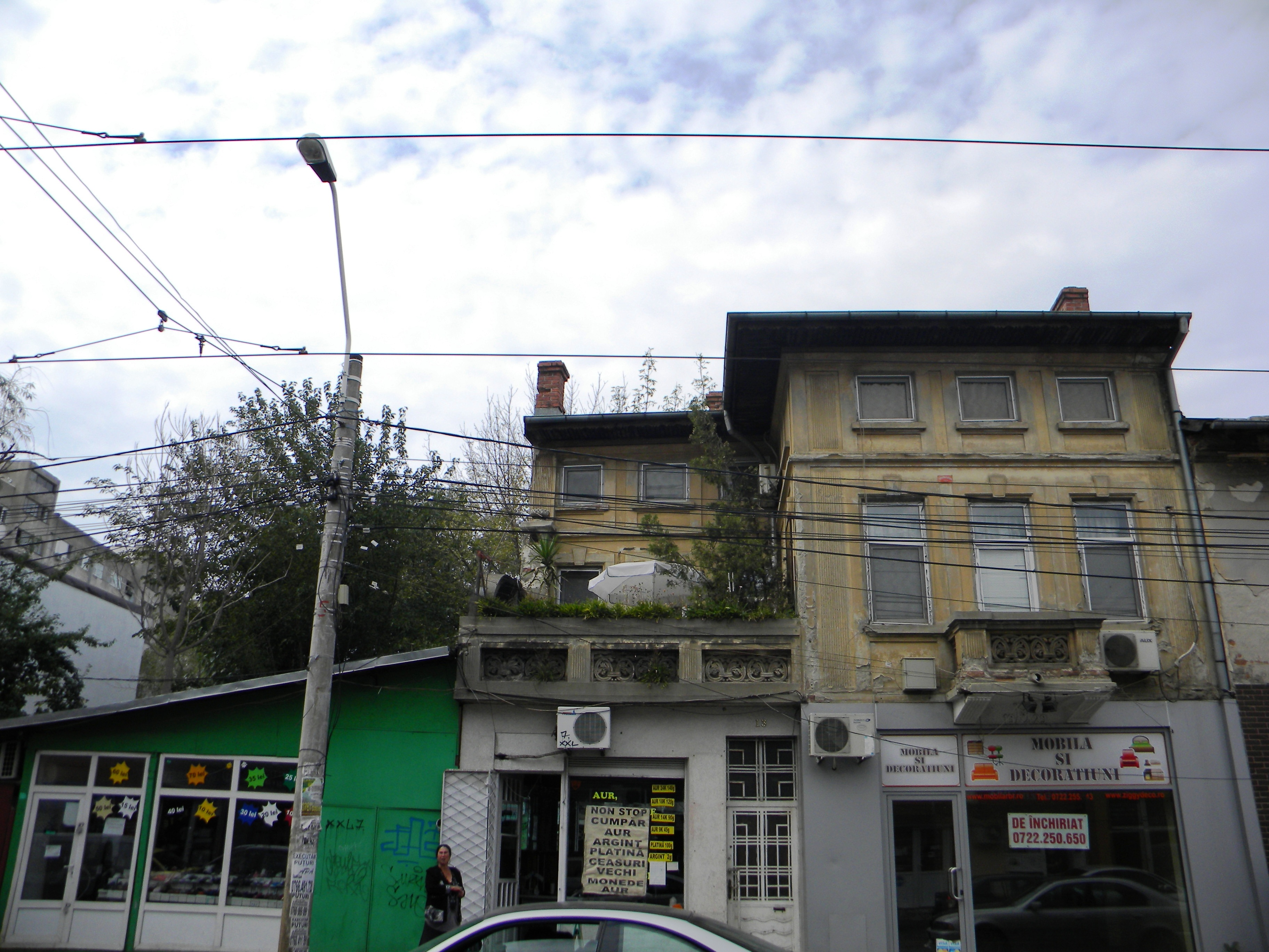 Bucuresti, Romania, Casa pe Str. Lizeanu nr. 13, sect. 2